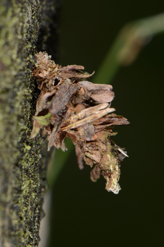 Sterrhopterix fusca case. The Netherlands - Nieuw-Bergen - De Grote Muijs